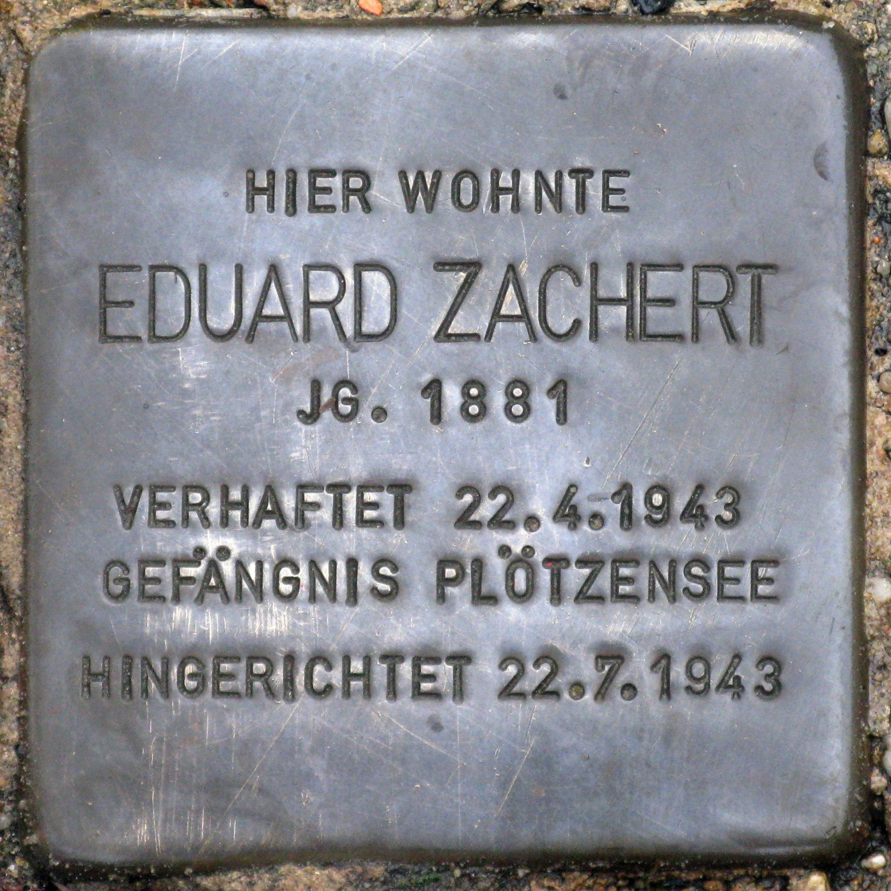 Stolperstein für Eduard Zachert, Mendelssohnstraße 10, Berlin-Prenzlauer Berg